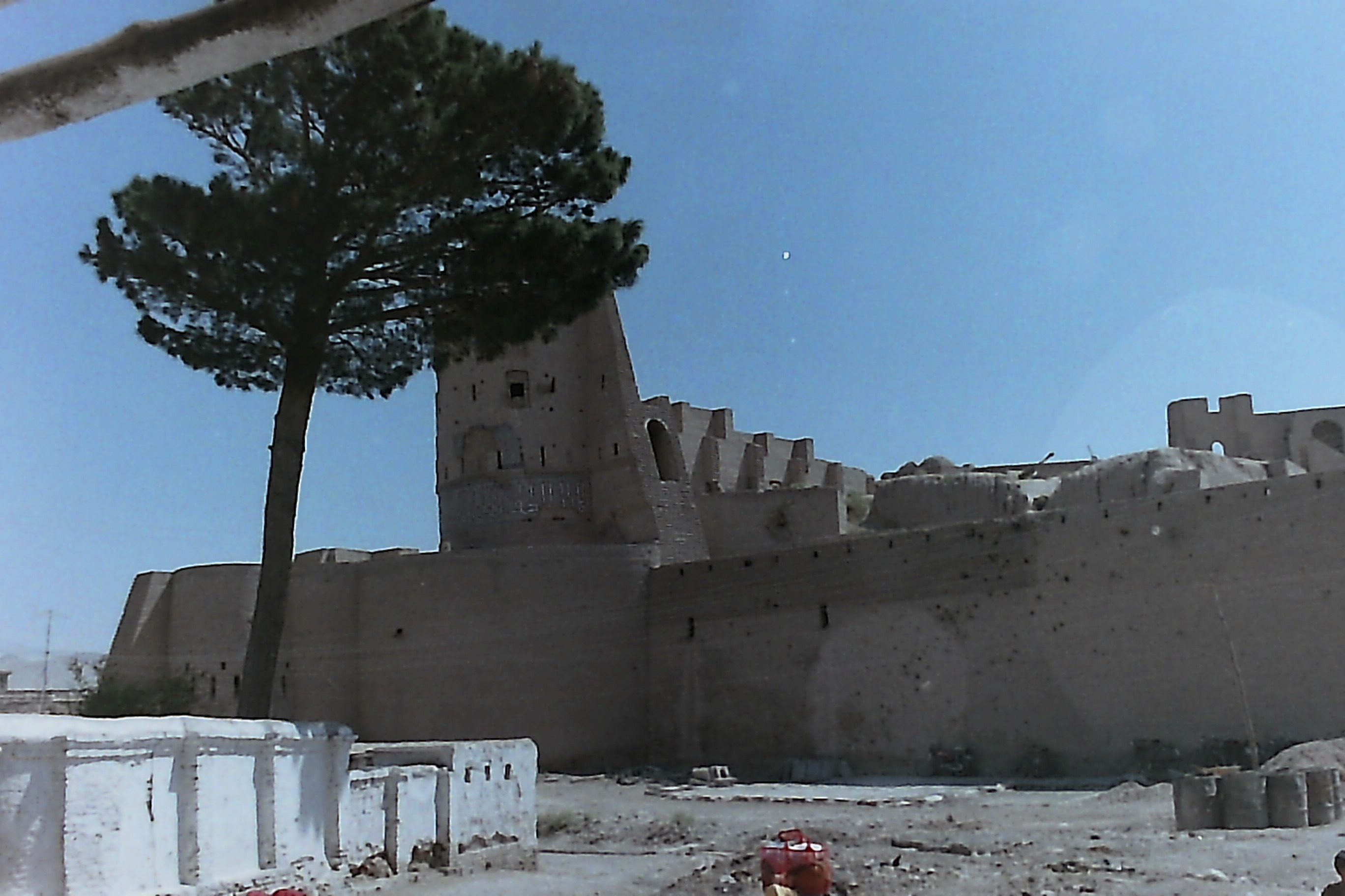 アフガニスタン・ヘラートにあるヘラート城 2003年8月に訪問した際に撮影（フィルムスキャナーでネガをデジタル画像化）